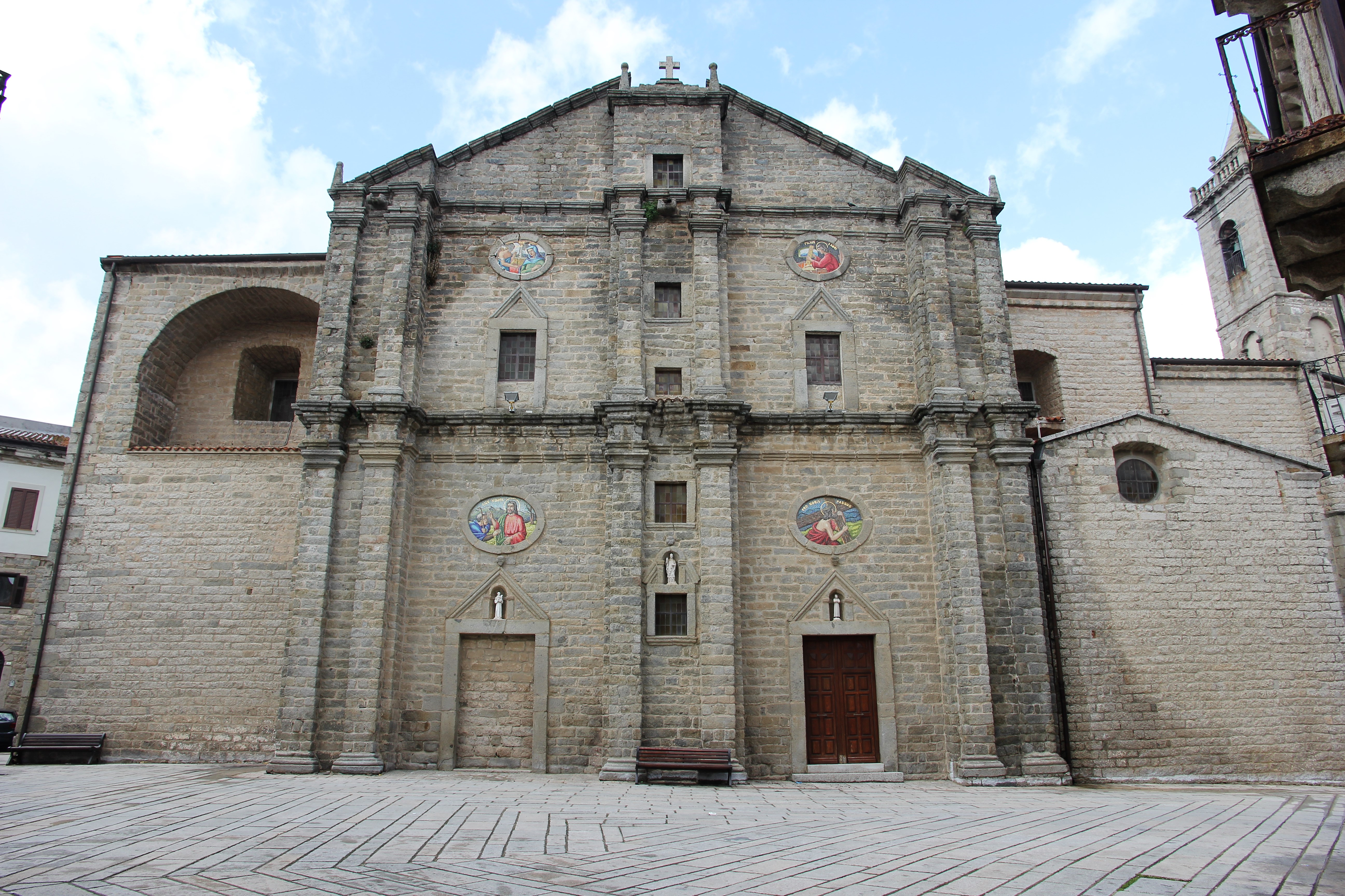 Tempio Pausania, chiesa di San Pietro